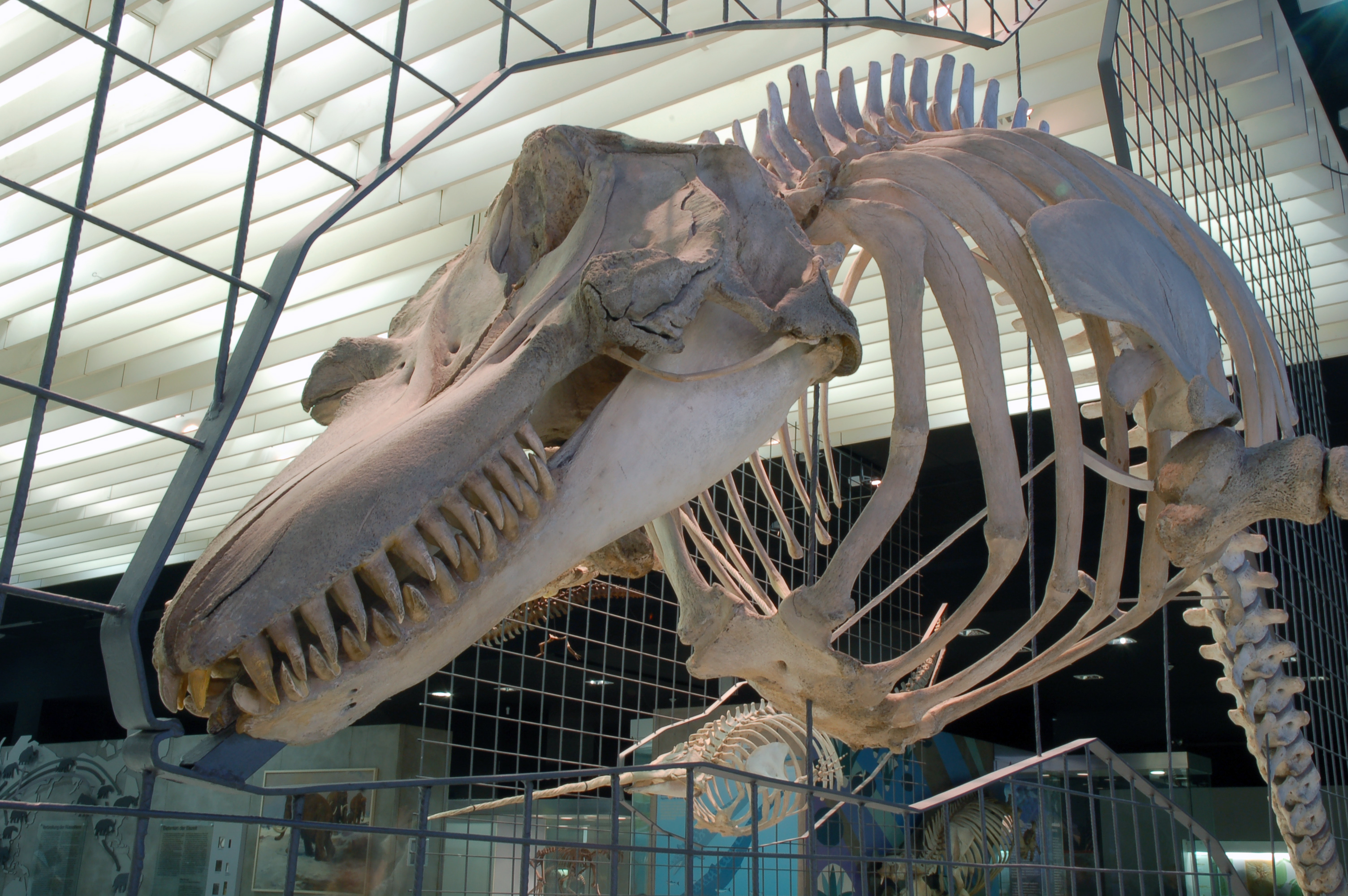 Skull of Orcinus orca, Senckenberg Museum Frankfurt am Main